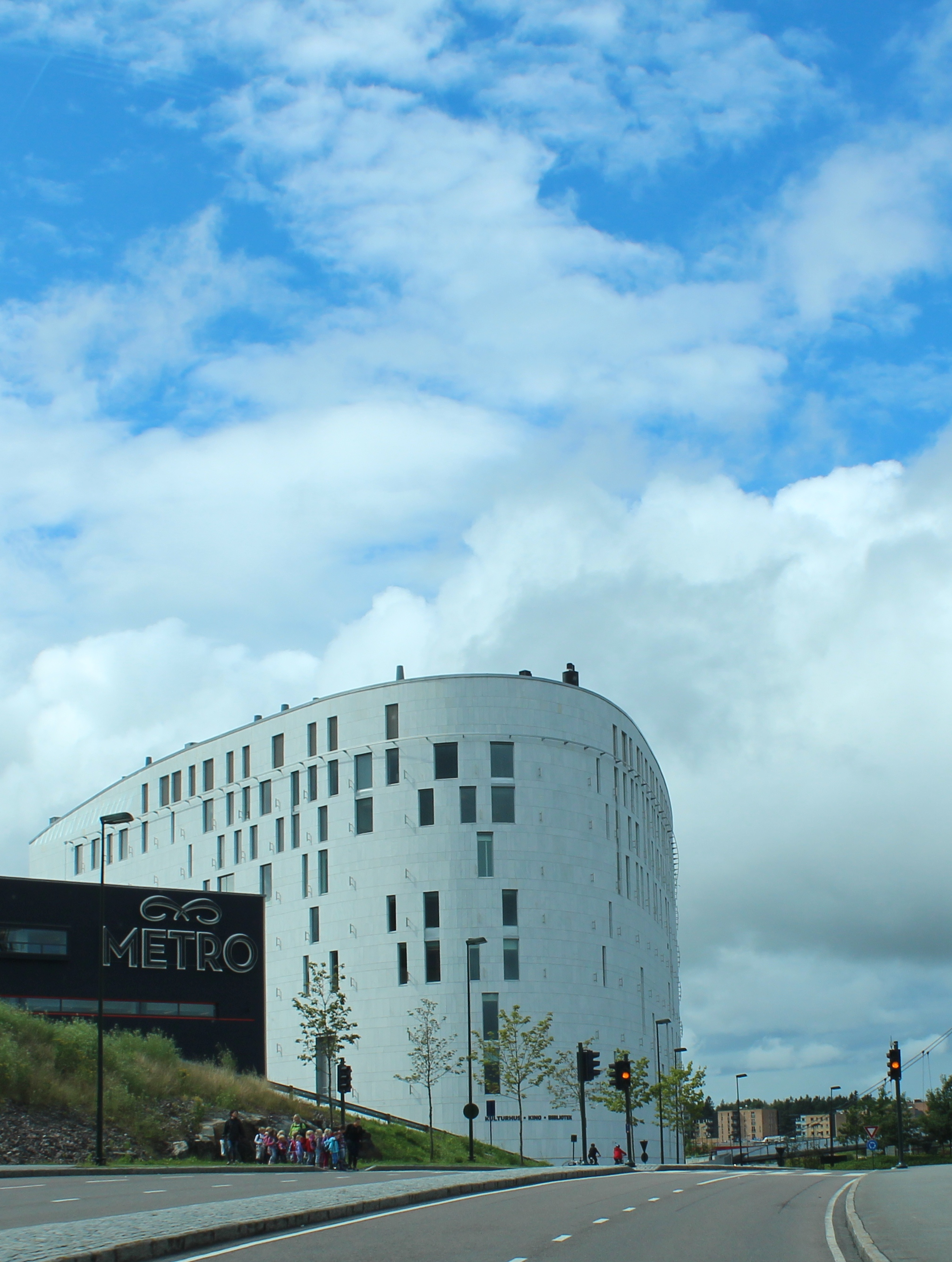 Lørenskog hus, Lørenskog kommune.